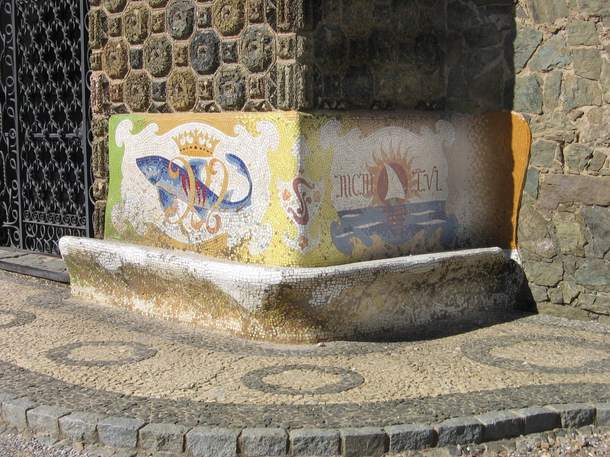 Banco de la puerta de entrada de la Torre Bellesguard, de Antoni Gaudí (Barcelona)